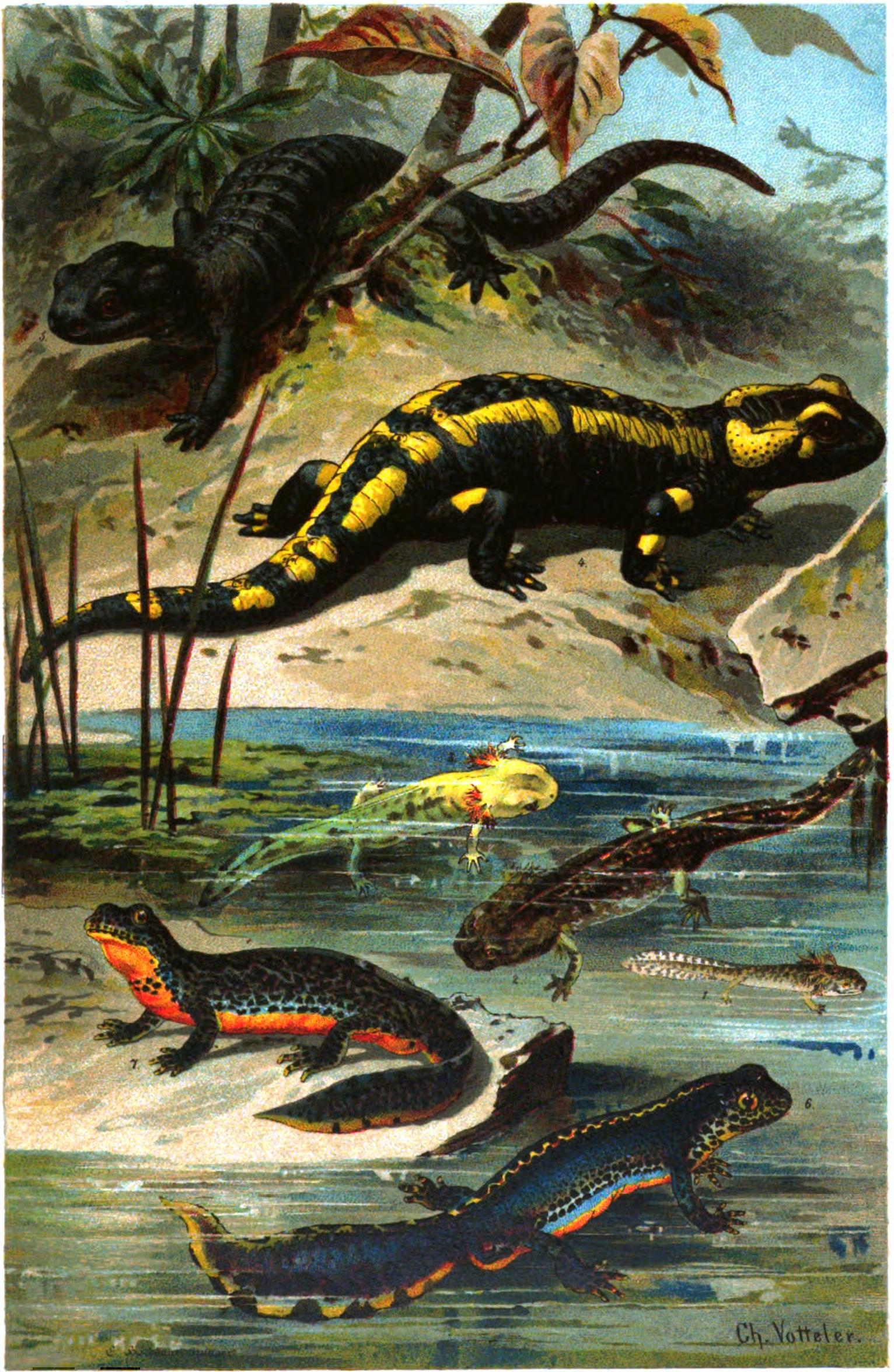 Feuer-Salamander (Salamandra maculosa): 1–3 Larven, 4. erwachsen. 5. Alpen-Salamander (Sal. atra). 6. Männchen und 7. Weibchen des Bergmolchs (Triton alpestris) im Hochzeitkleid. Signature bottom right: Ch. Votteler.